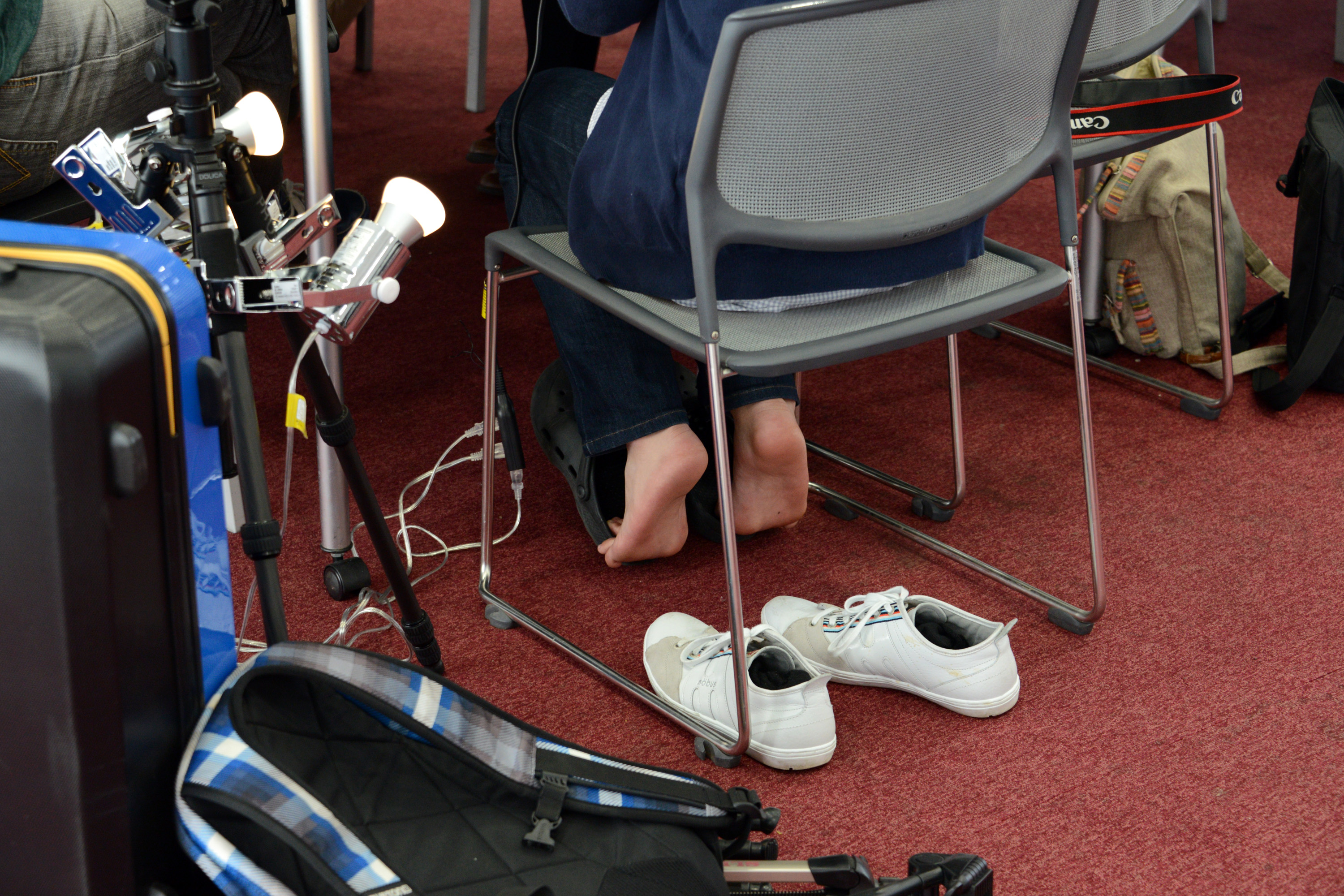 photo by Takumi Sano, ISAC Tokyo Bureau, CC BY.